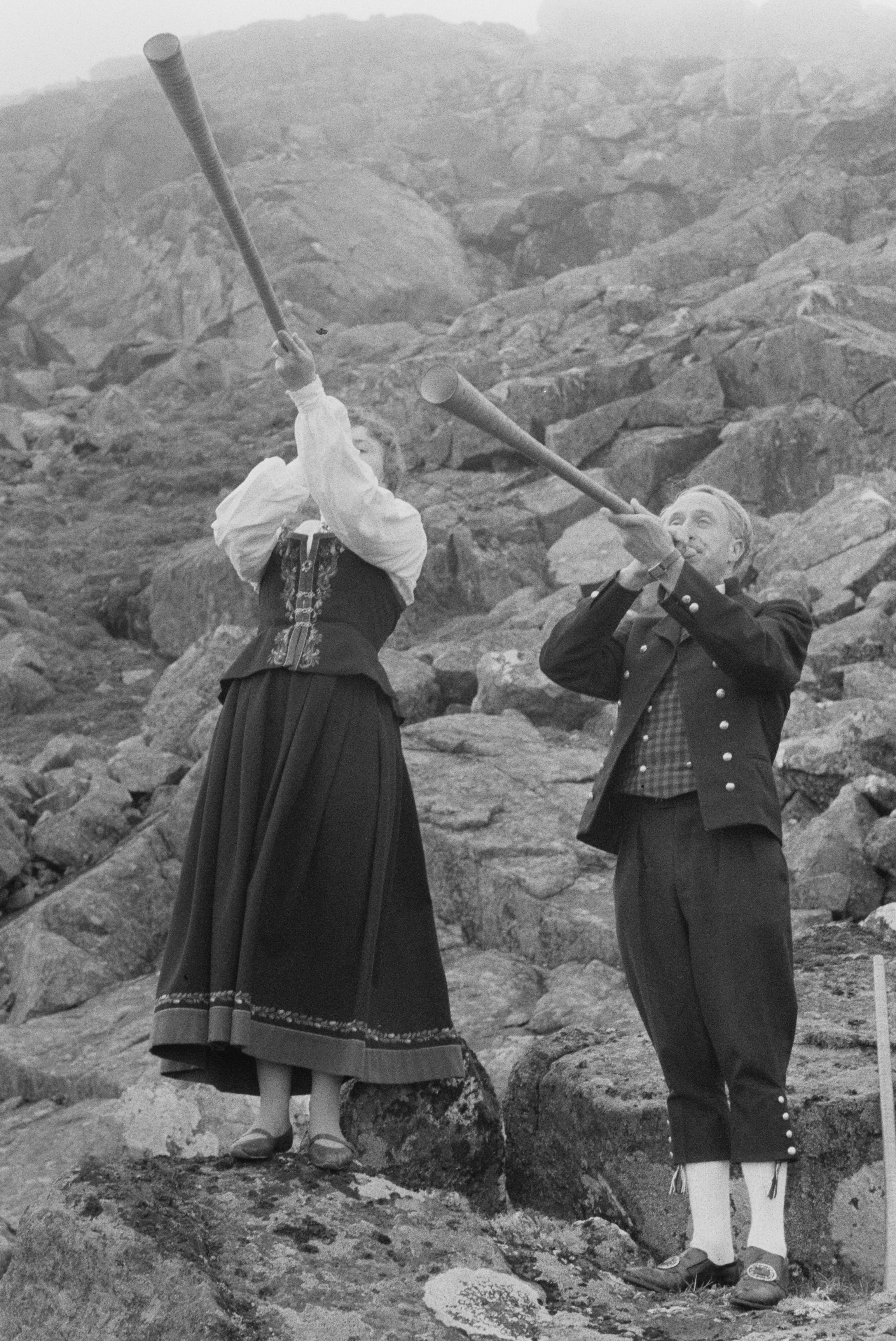 Bildet er hentet fra Arkivverket. Foto tatt i forbindelse med reportasje om den norske filmen Freske fraspark fra 1963. Manus var ved Kjell Aukrust og Bjørn Breigutu. Regi ved Bjørn Breigutu. Kjell Aukrust, Leif Juster, Turid Caldwell, Alfhild Hovdan, Per Bistrup, Lalla Carlsen Arkivinstitusjon : Riksarkivet Arkivnavn : Billedbladet NÅ Sted : Norge, Hedmark, Alvdal, Emneord: Film, Filminnspilling Avbildet